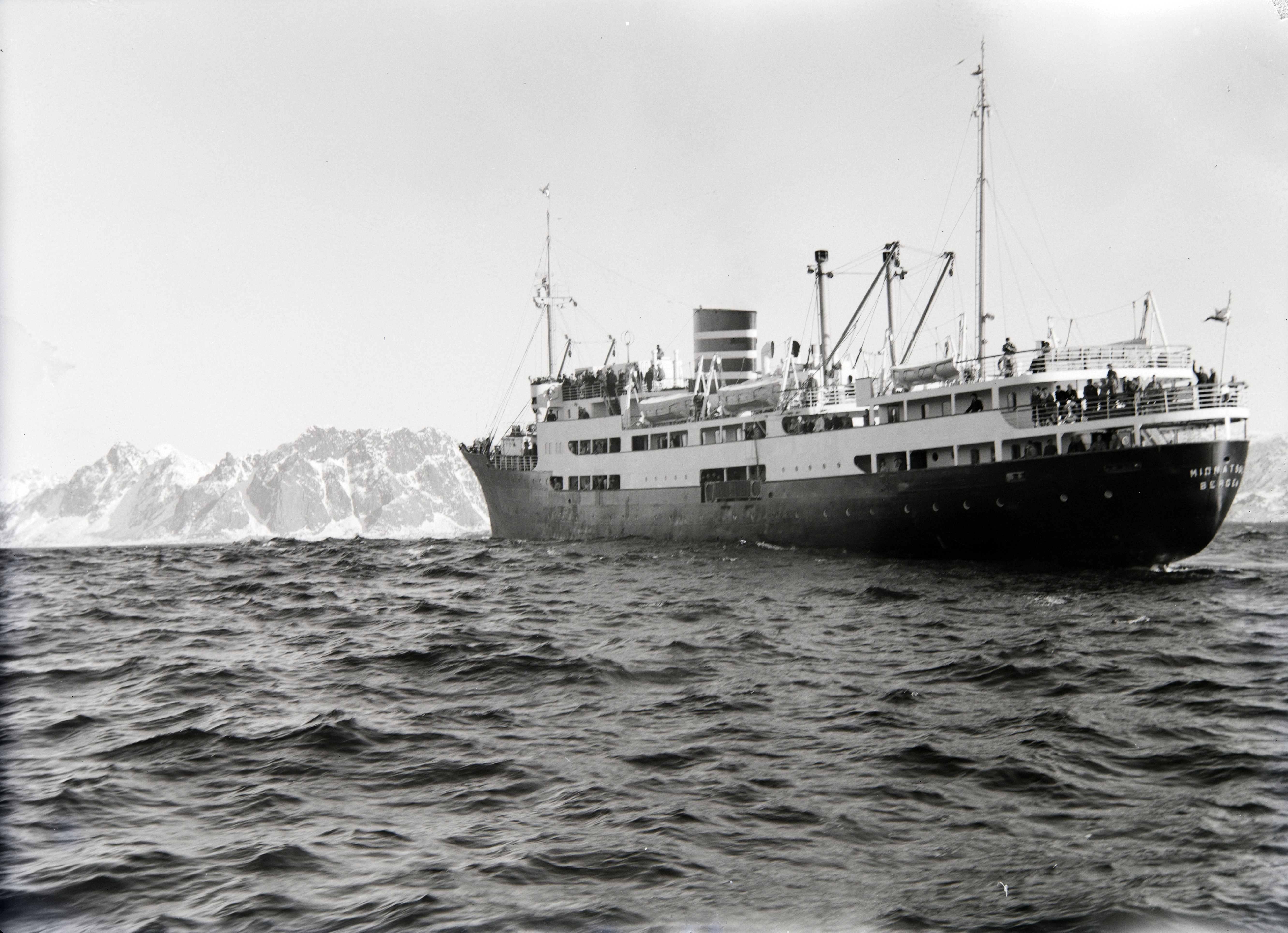 Bildet er hentet fra Nordlandsmuseet bildesamling etter Kanstad. Motivbeskrivelse: M/S "Midnatsol" Nøkkelord: Motorskip Sjøtransport Kystfart